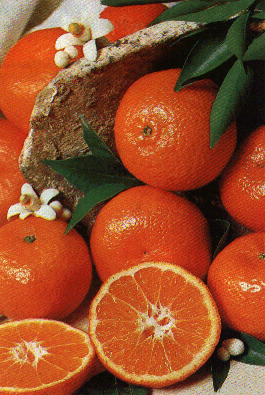 Clemenules